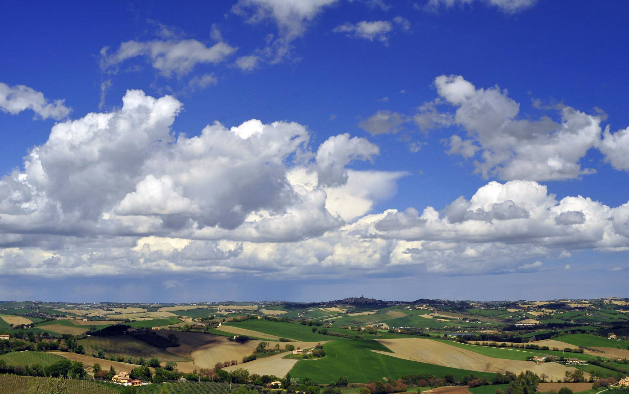 Colline della campagna di Montecarotto